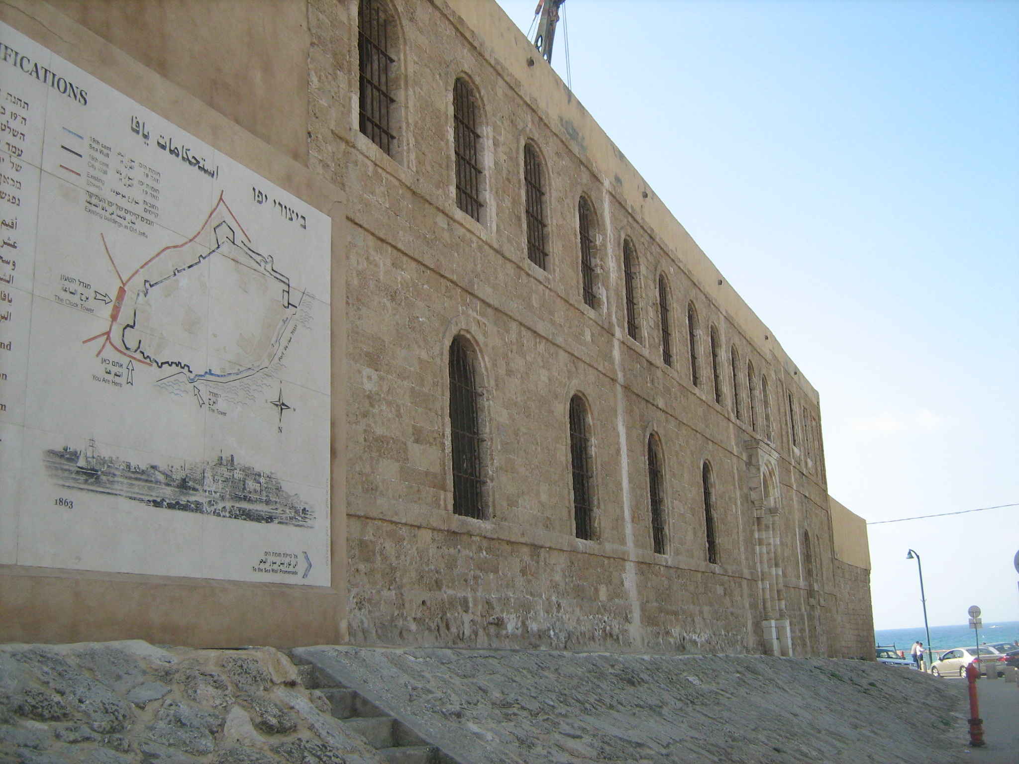 החומה הצפונית של העיר העתיקה ביפו